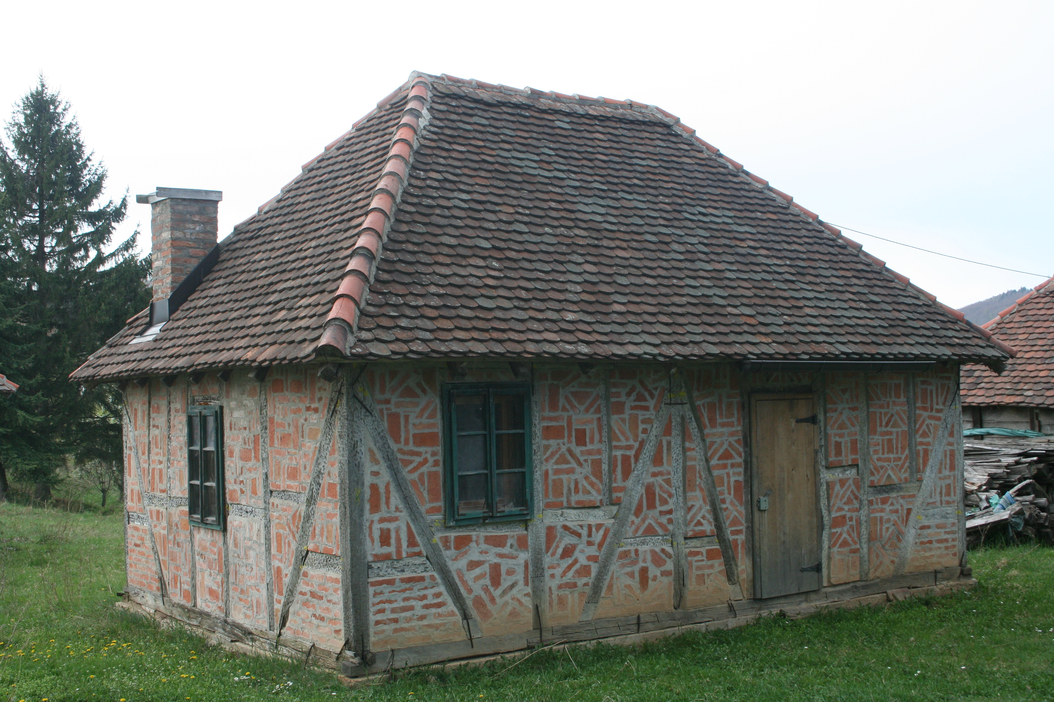 Etno selo na Mačkovom kamenu